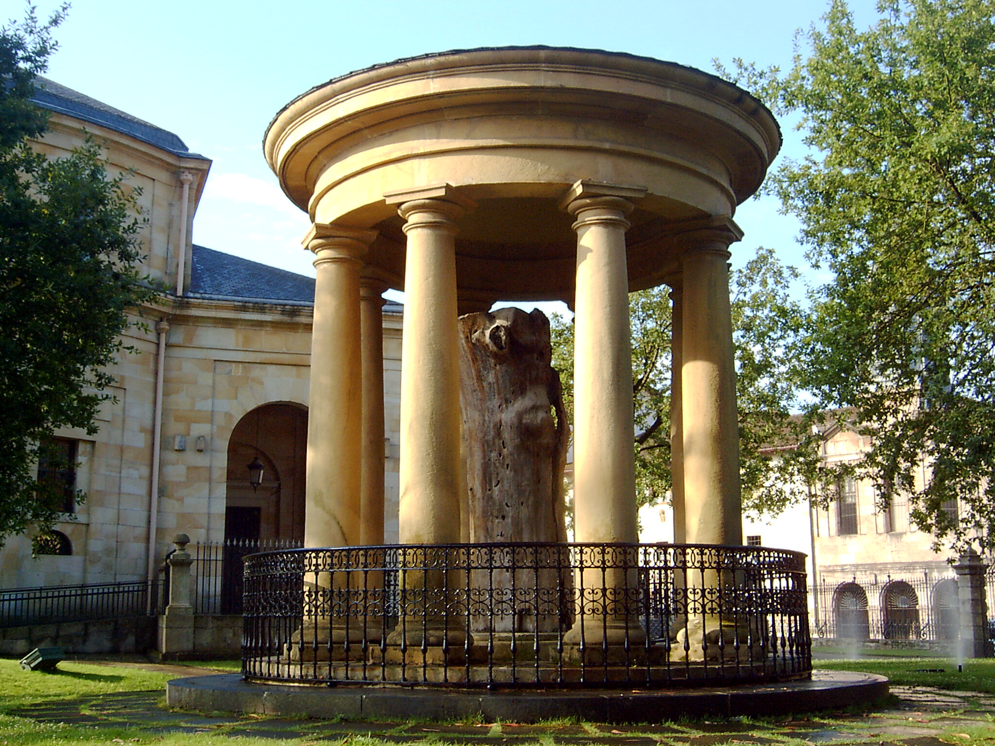 Gernika. Gernikako arbola